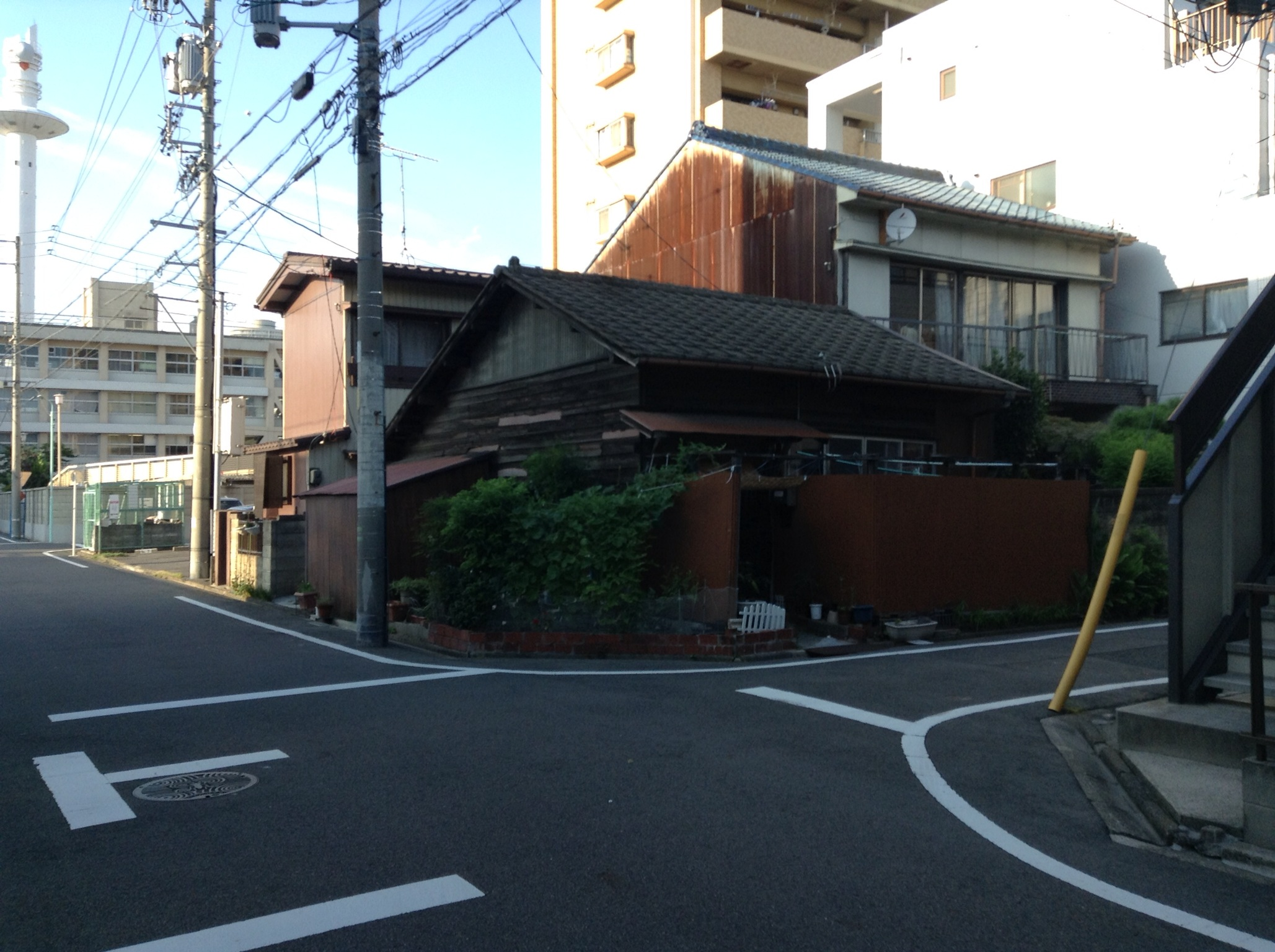 名古屋市北区の萩野通住宅